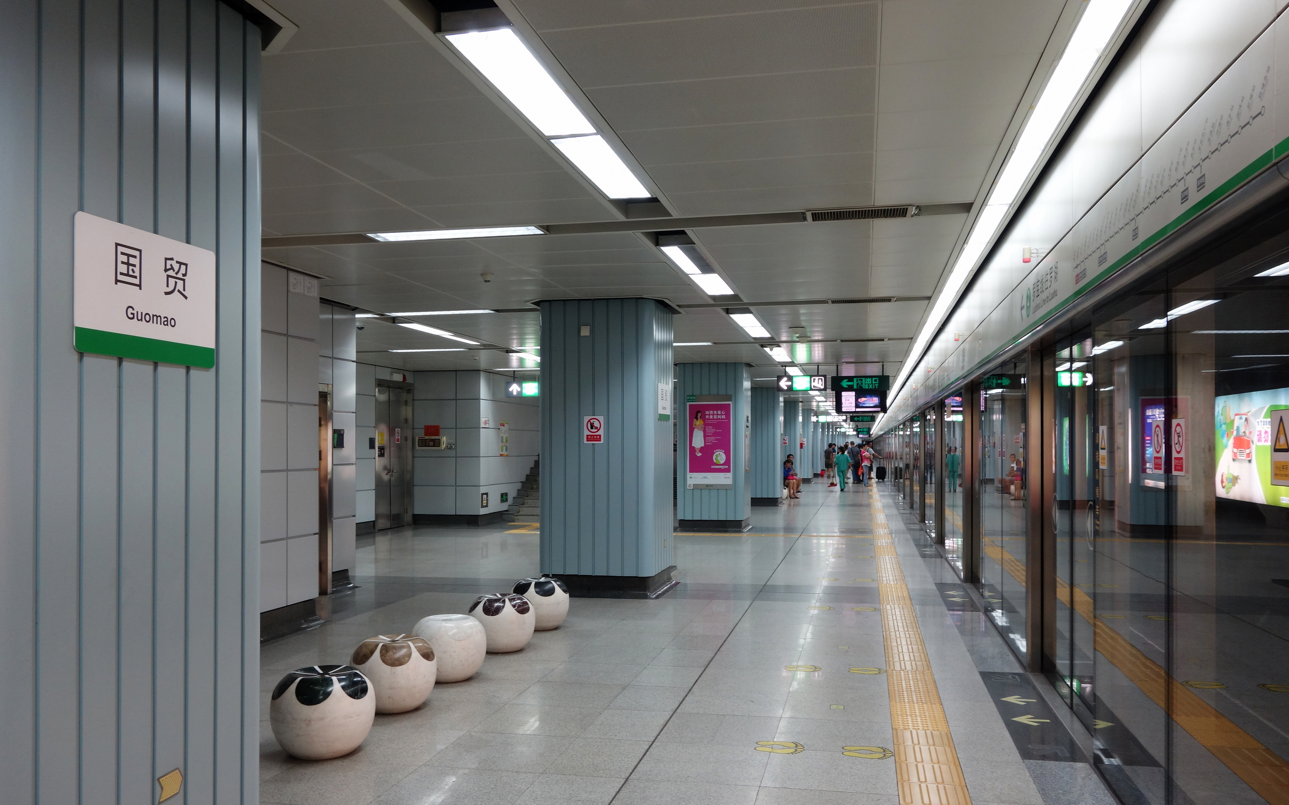 深圳地铁罗宝线地下三层侧式站台